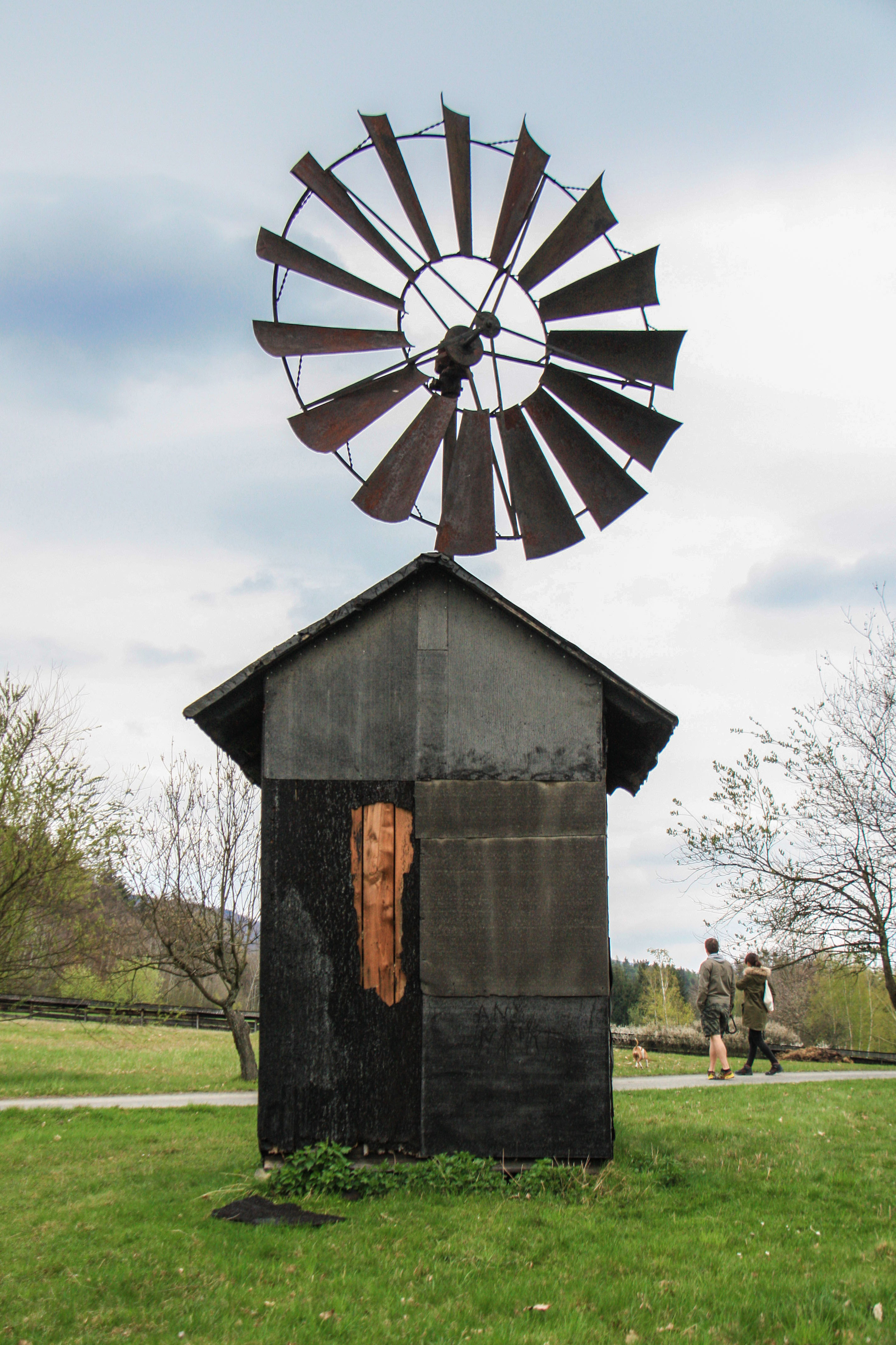 "Mały młyn" w Valašské muzeum v přírodě